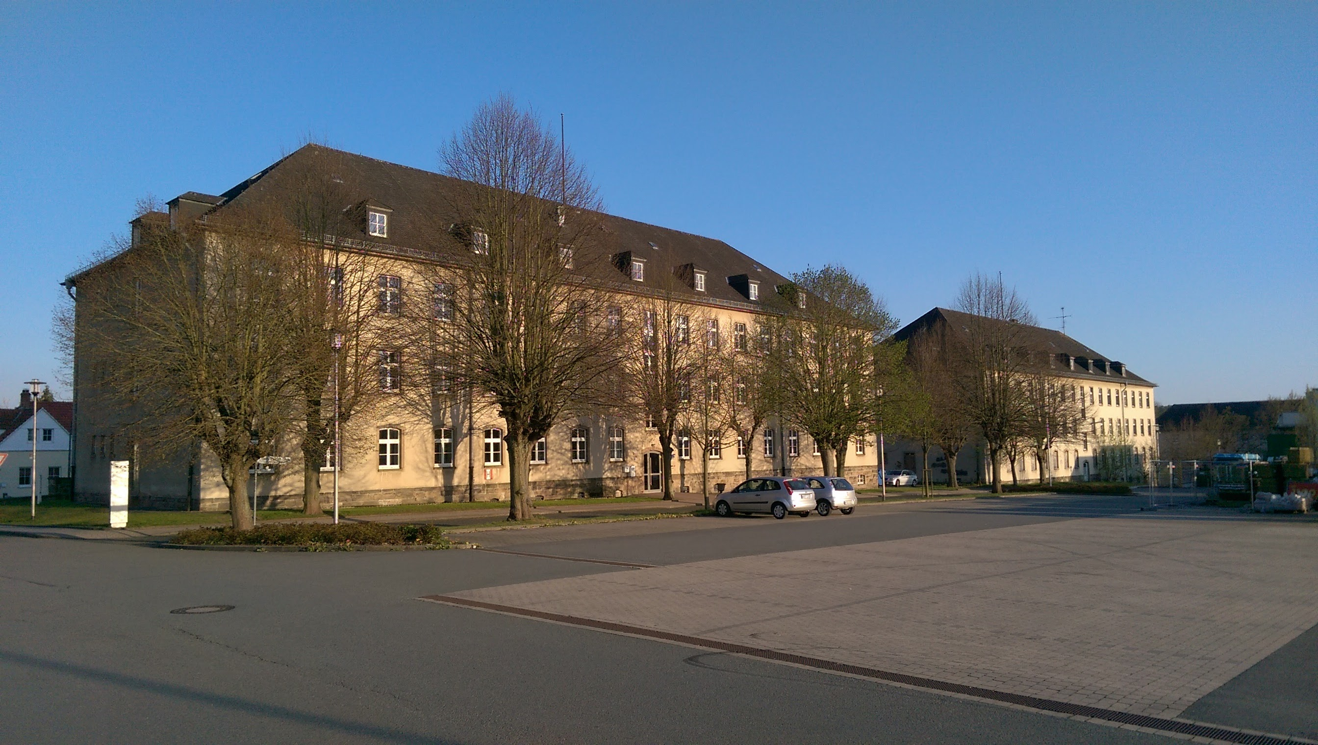 Arobella Therme Arolsen